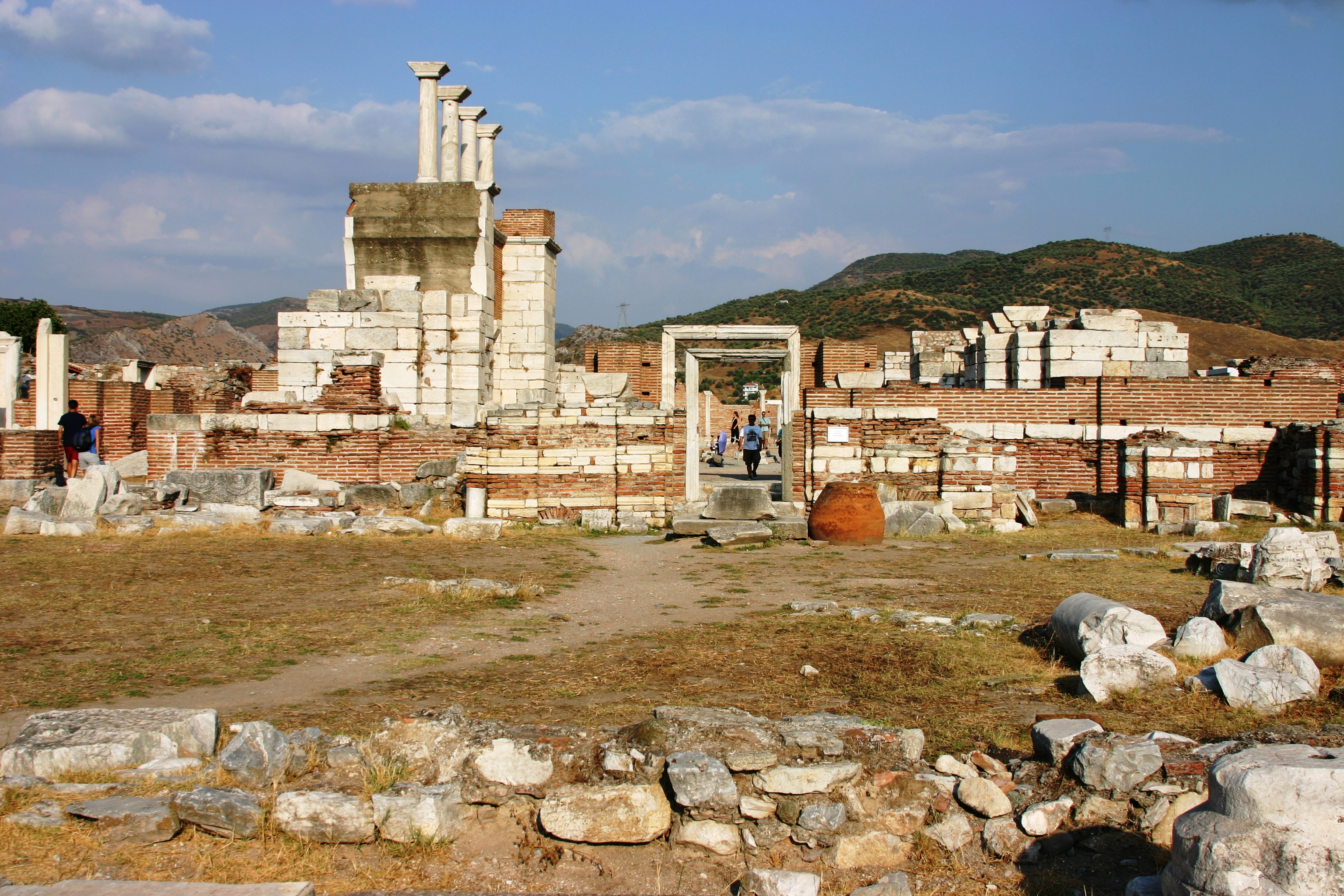 Igreja de São João, em Éfeso